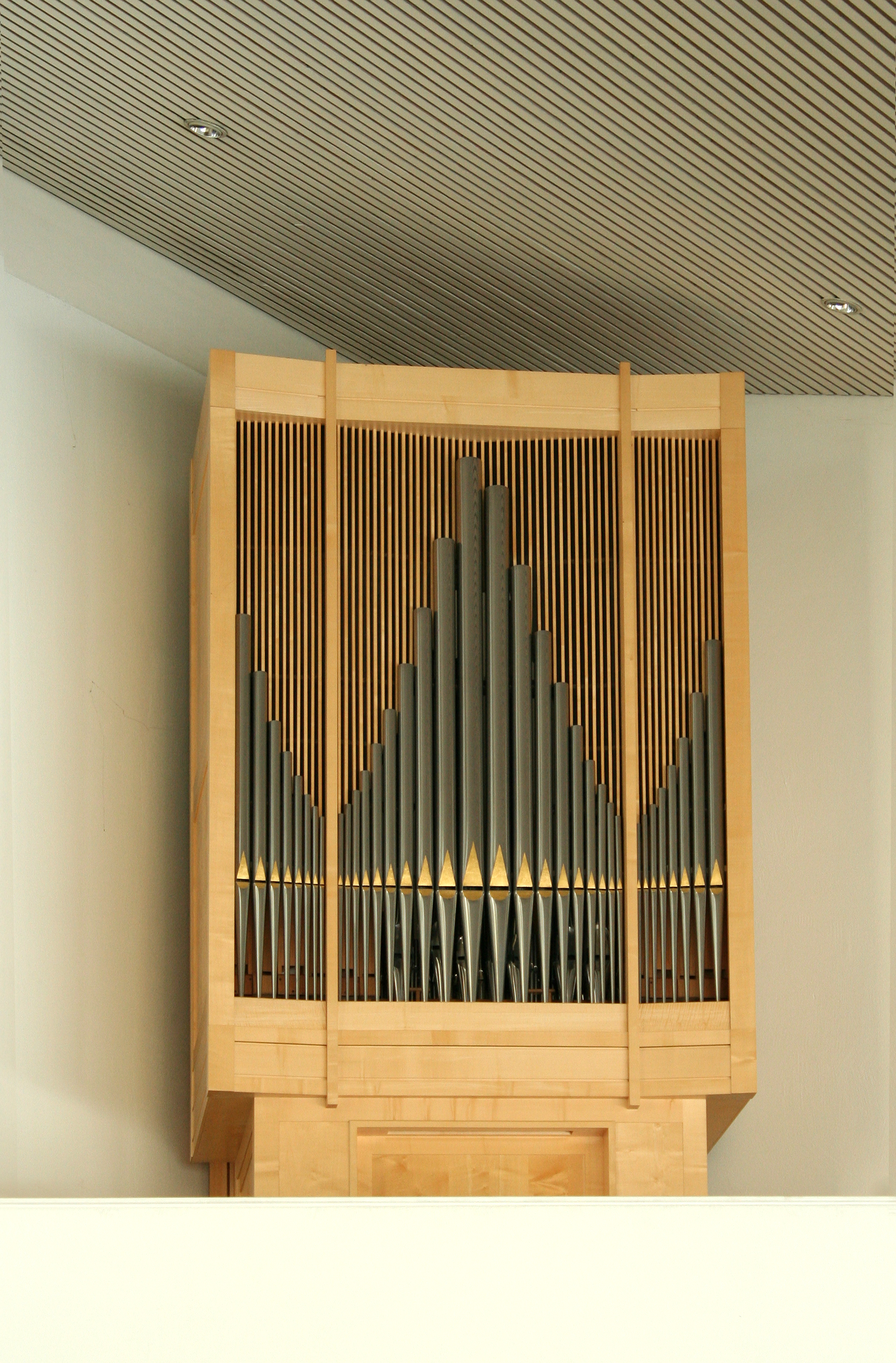 Römisch-katholische Kirche St. Franziskus Maur-Ebmatingen, Orgel